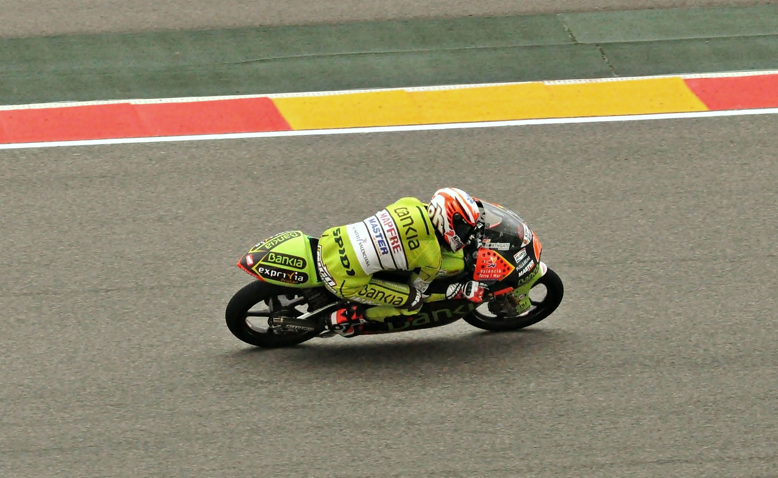 motorland 2011